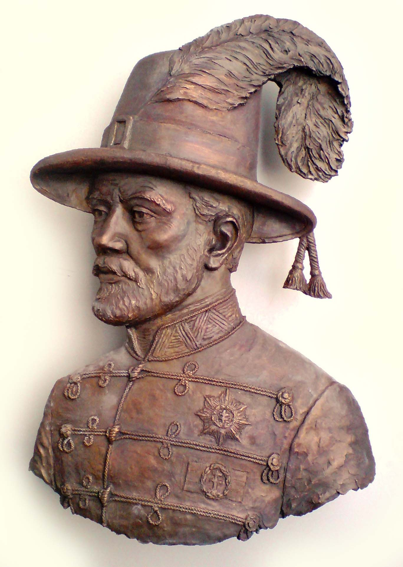 Juha Richárd: Bem József domborműve (Debrecen, Bem tér)